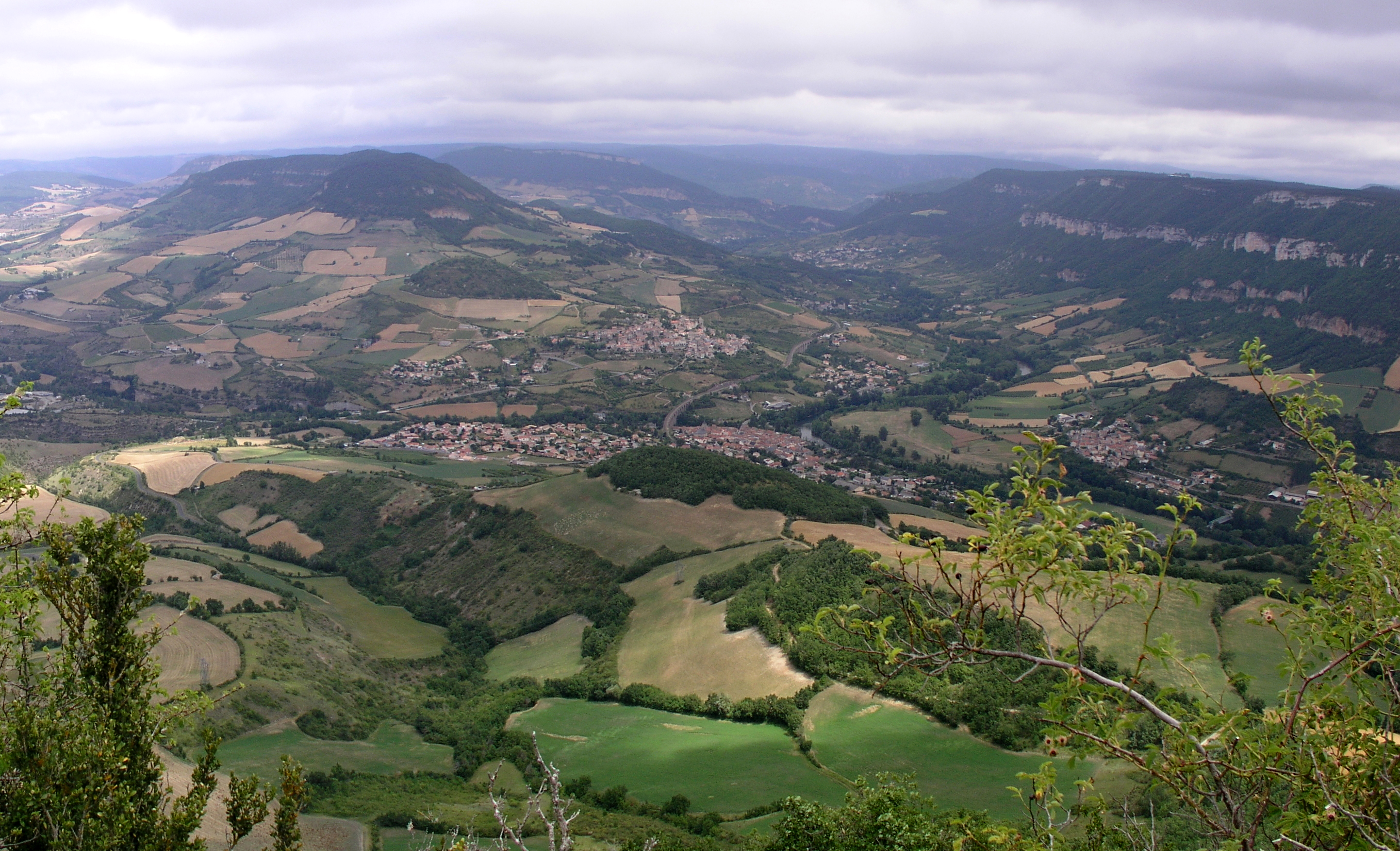 Aguessac vu depuis le Puech d'Andan.